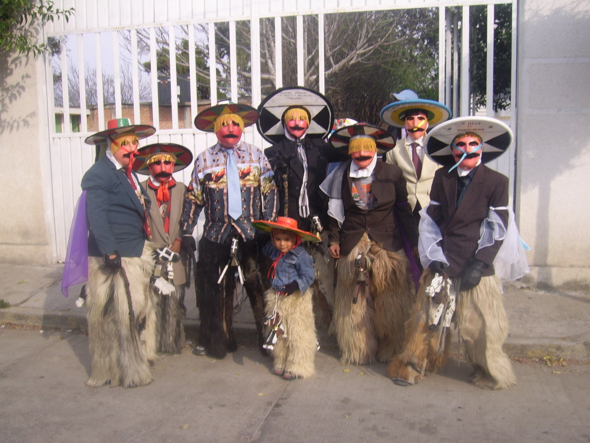 Chivarrudos de Quilehtla